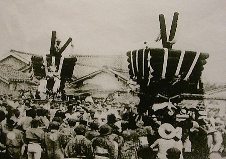 大正8年の本宮 かきあい